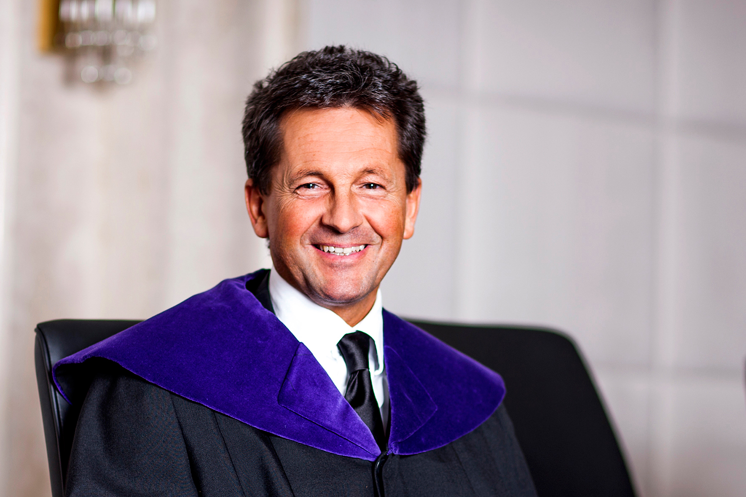 Dr. Christoph Herbst, Mitglied des österreichischen Verfassungsgerichtshofs seit 2011.